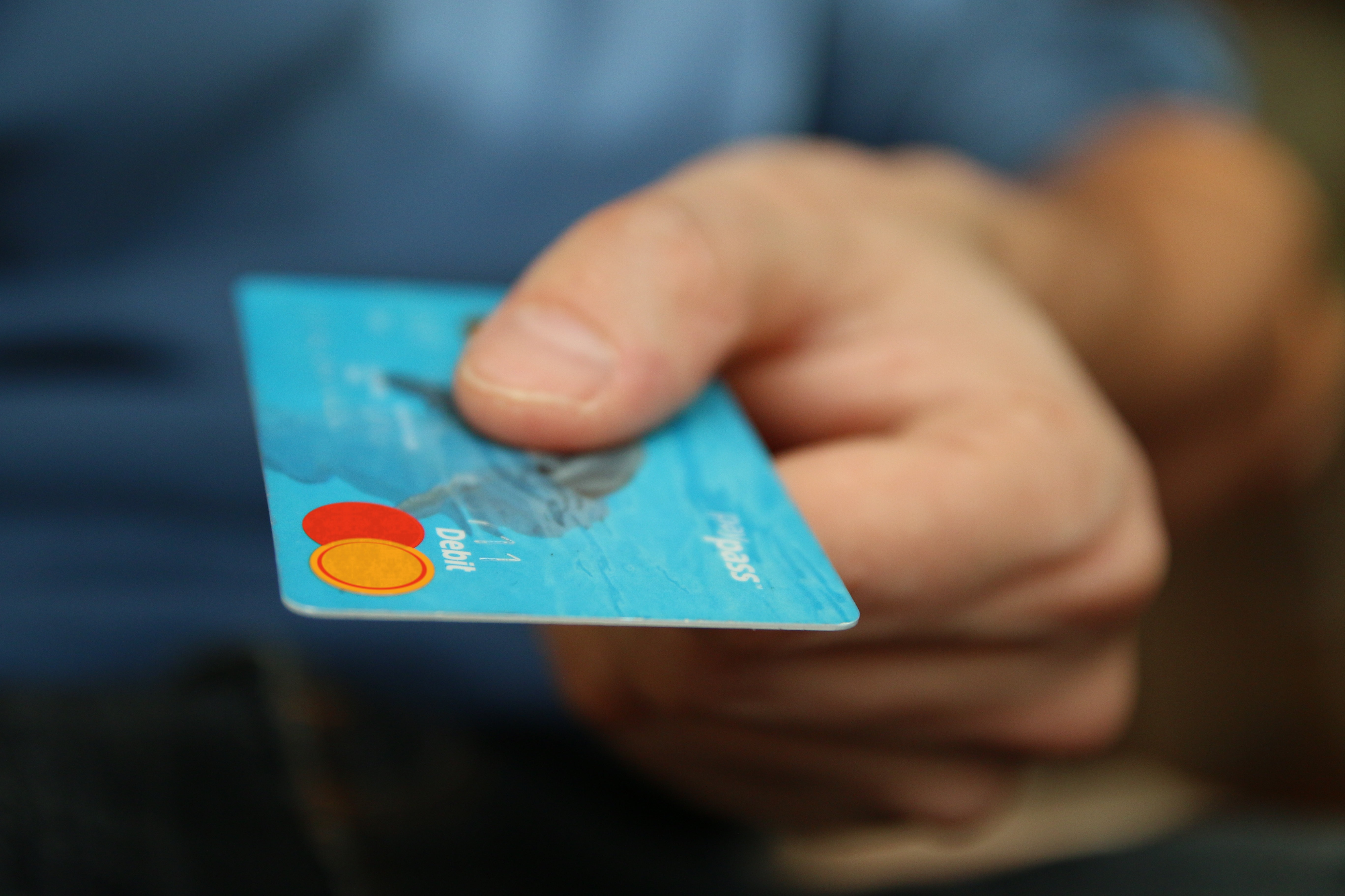 Банкаўская картка